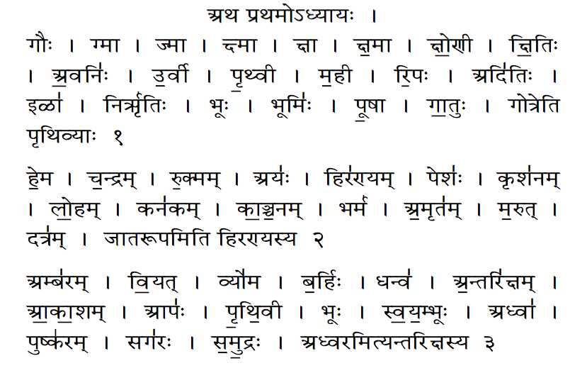 निरूक्त जो वेदों को समझने के लिए शब्द उत्पत्ति और अर्थ विवेचन का ग्रंथ है, उसके प्रथम अध्याय का एक भाग - उदाहरण हेतु ।